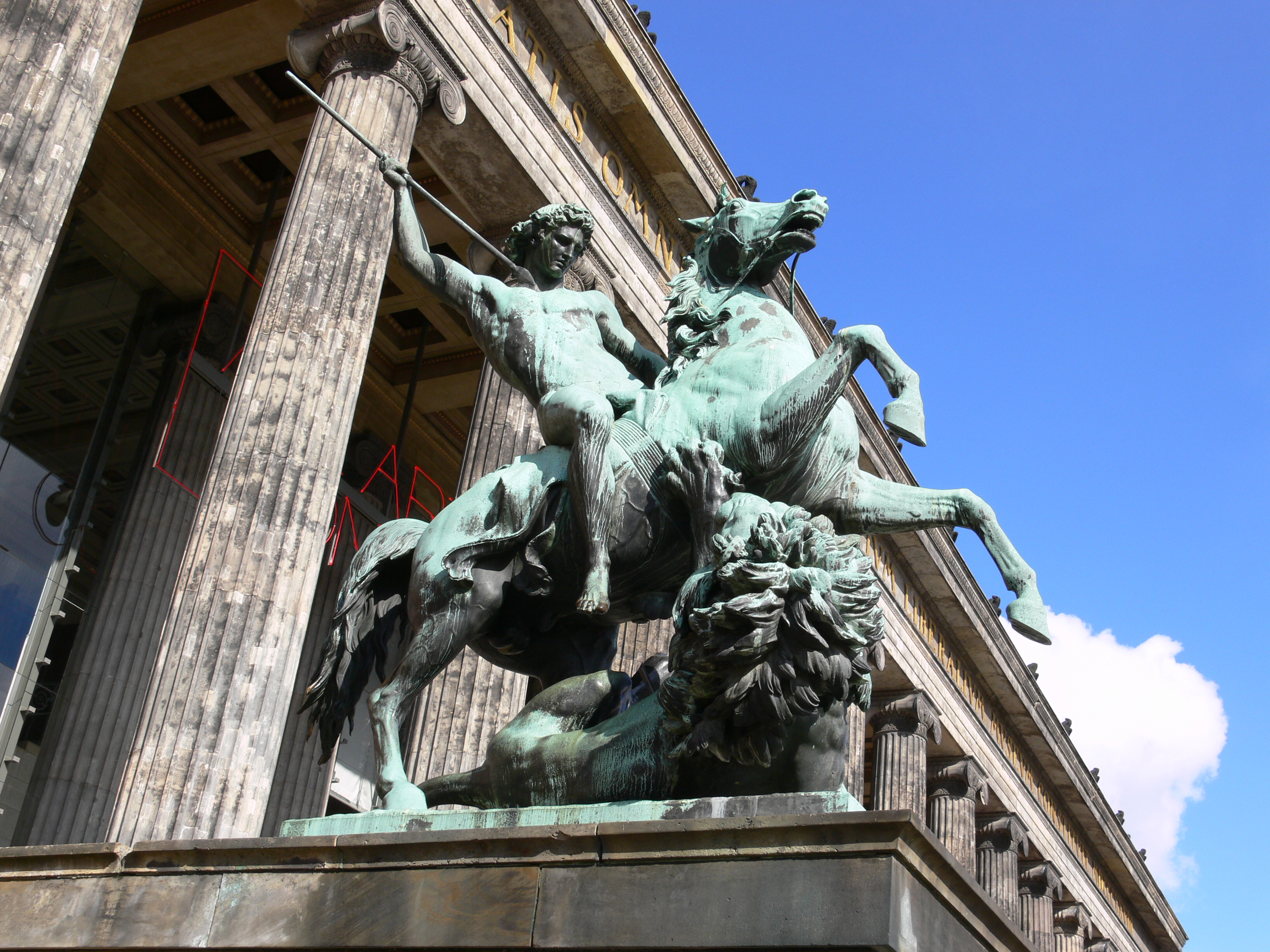 Löwenkämpfer von Albert Wolff, Statue am Alten Museum, Berlin